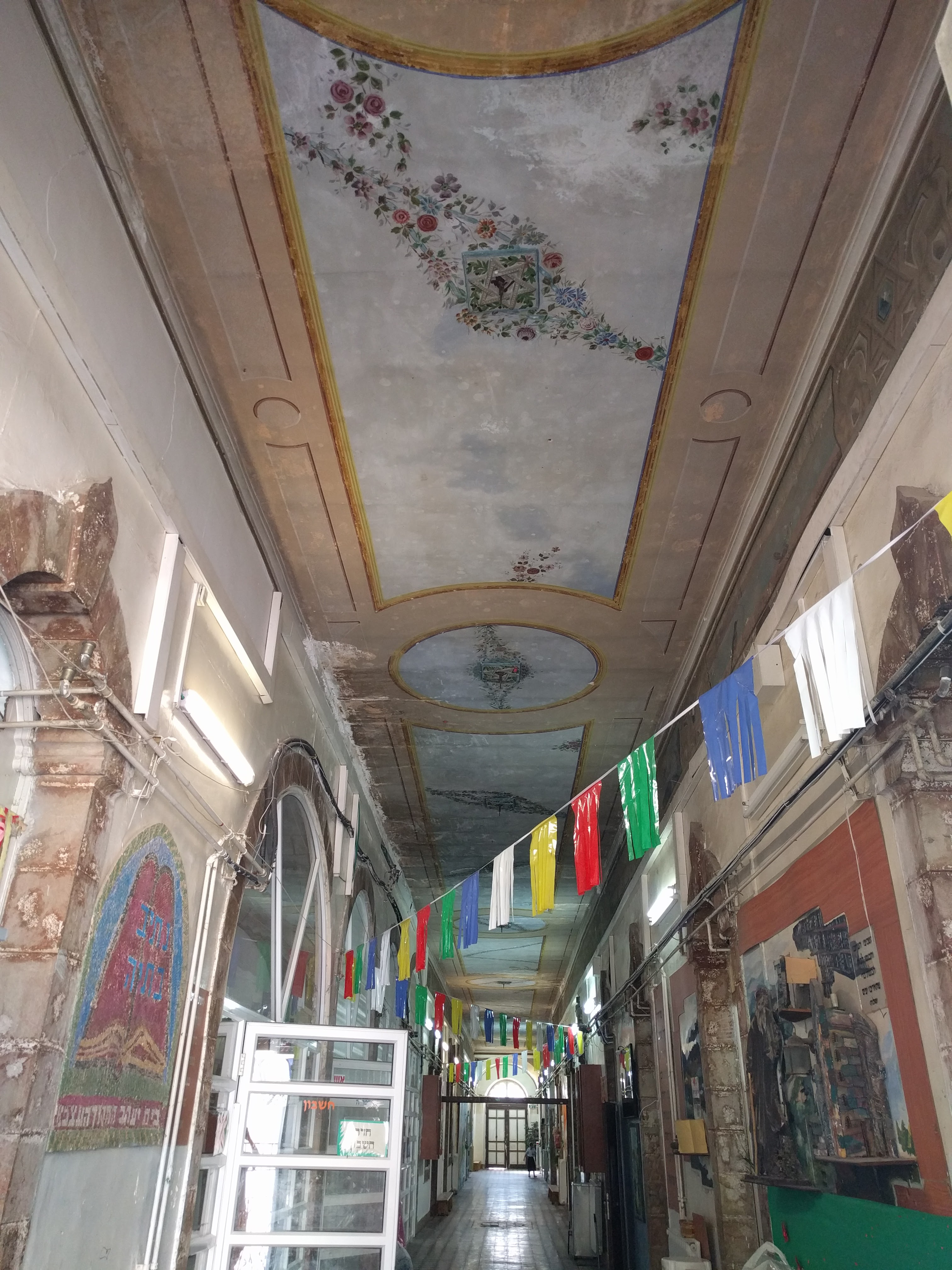 פנים המבנה שבו היה בית הספר שפיצר